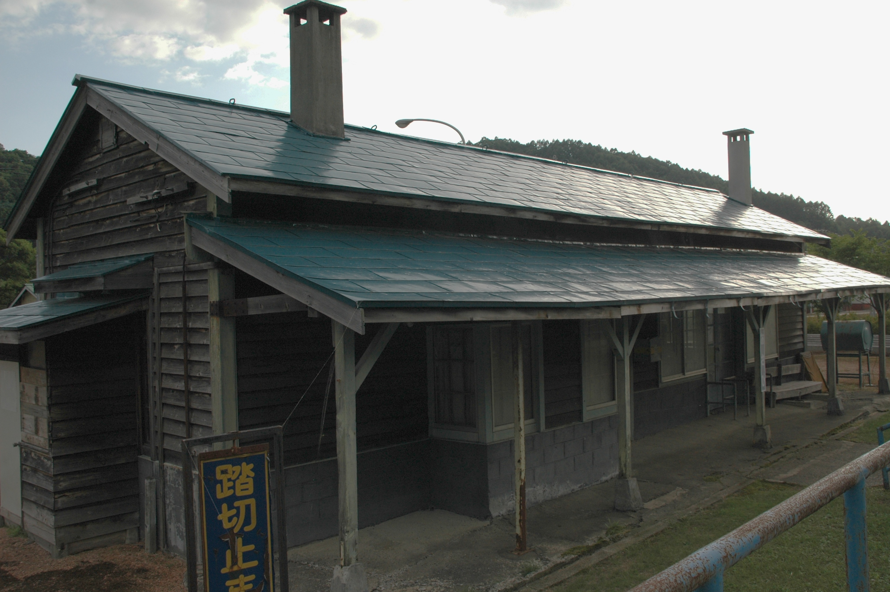 Asahi Station, (Manji Line), Home Side, Hokkaido, Japan.